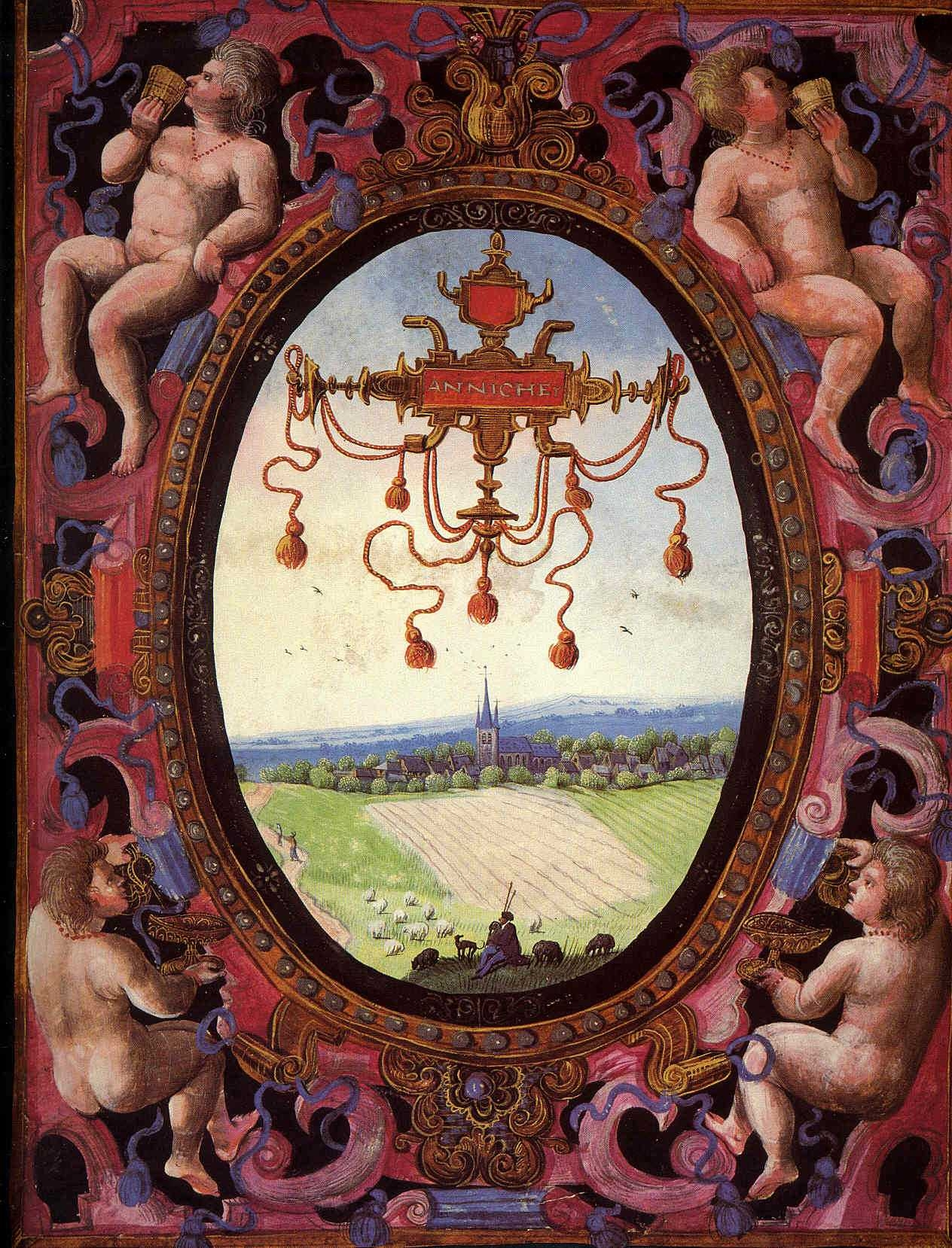 Aniche (cartulaire de Charles de croÿ); Album de Croÿ, gouache peinte sur parchemin par Adrien de Montigny pour Charles de Croÿ Le chemin creux du 1er plan serait celui venant de Bouchain et conduisant à Auberchicourt et Douai. L'artiste a figuré sur le toit de l'église les crochets qui y retiennent la neige et/ou permettent d'y accrocher des échelles pour l'entretien des ardoises. Deux tourelles sont visibles sur le côté de l'église, garnies de flèches couvertes d'ardoises. La nef semble être faite de quatre travées sans collatéraux. Le choeur plus étroit et plus bas est inhabituellement allongé (au moins trois travées). L'église a été reconstruite de 1857 à 1859 et le clocher refait en 1872.